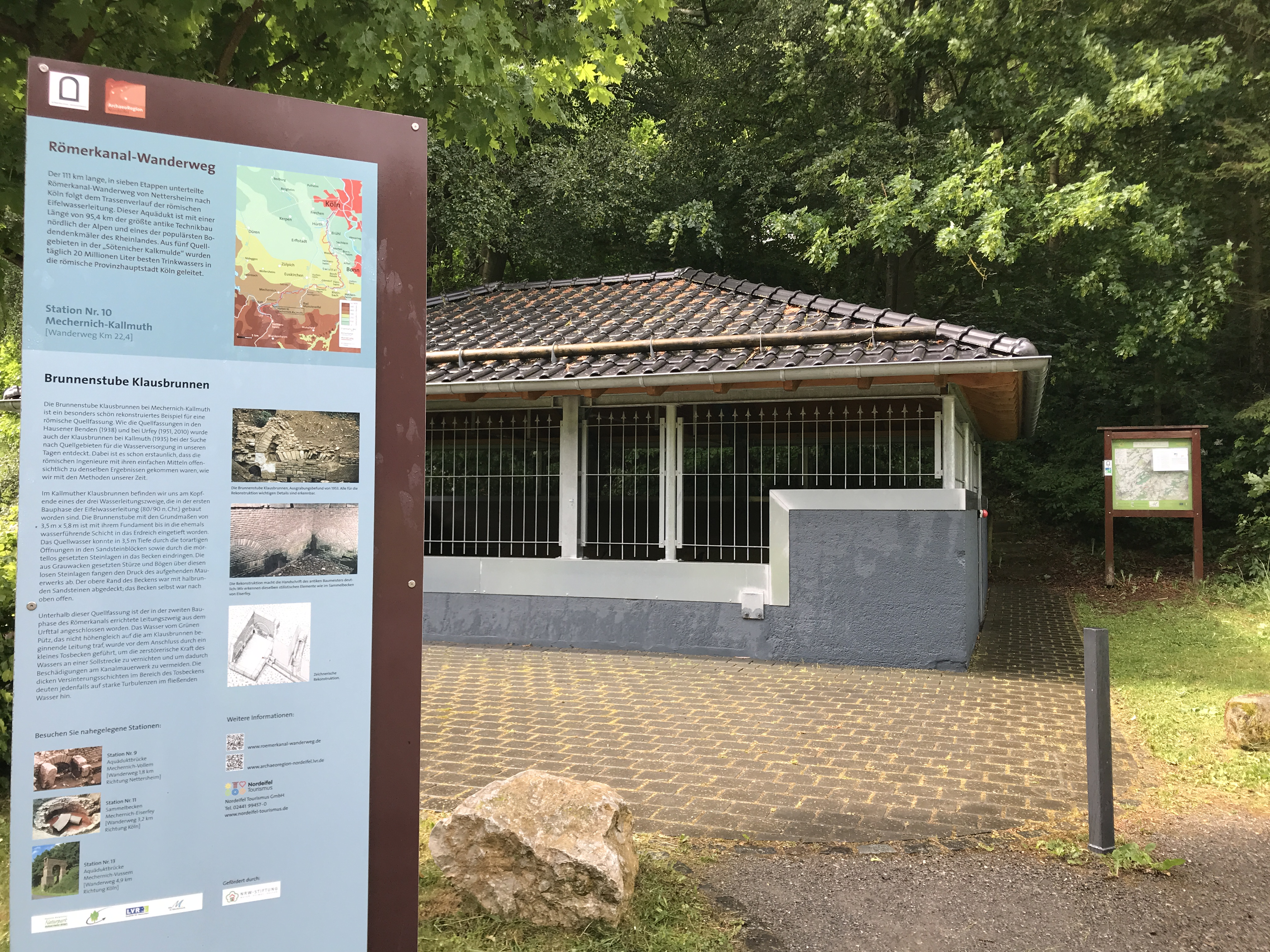 Der Klausbrunnen im Dorf Kallmuth in Nordrhein-Westfalen